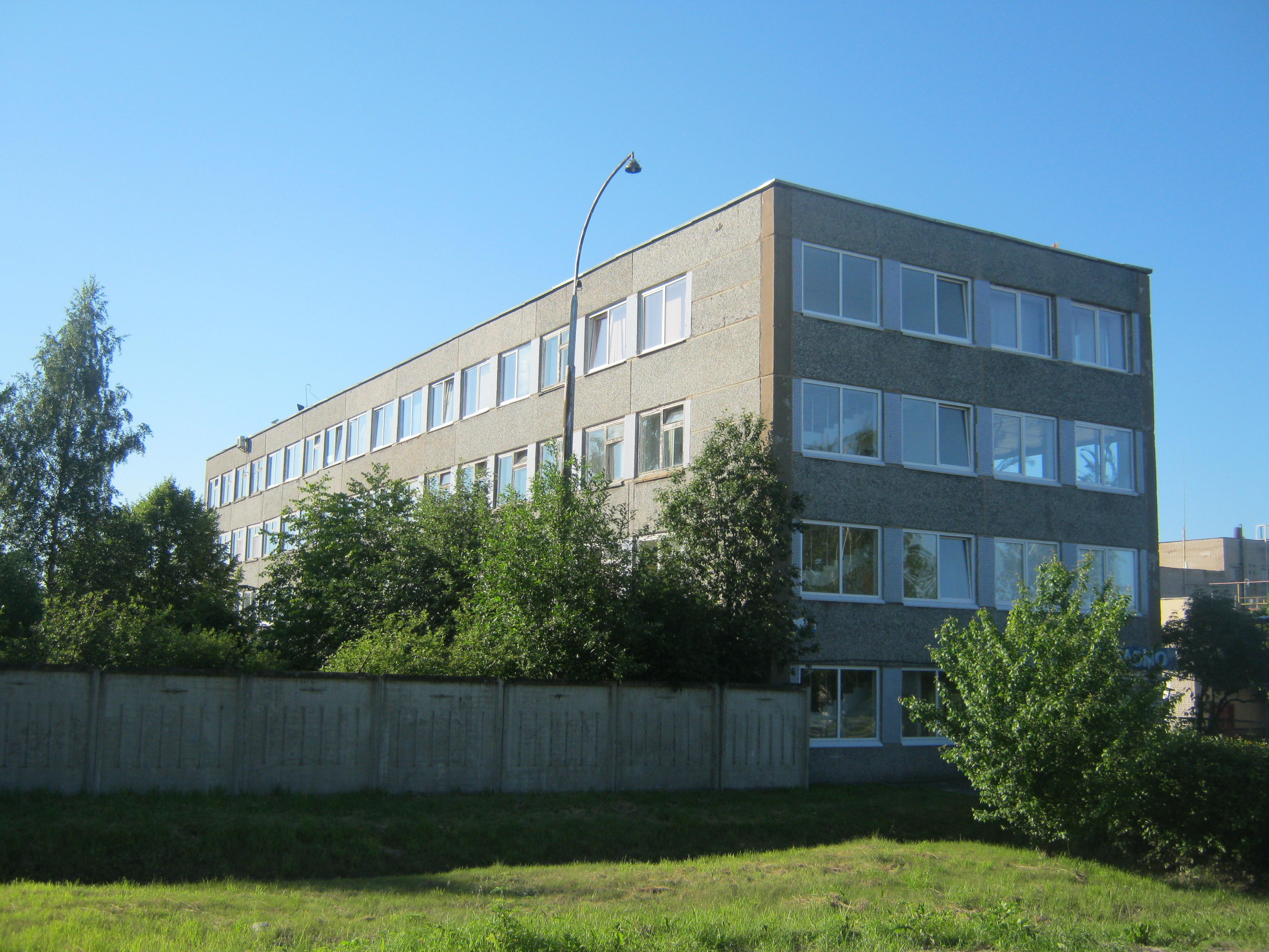 Промышленность Петрозаводска